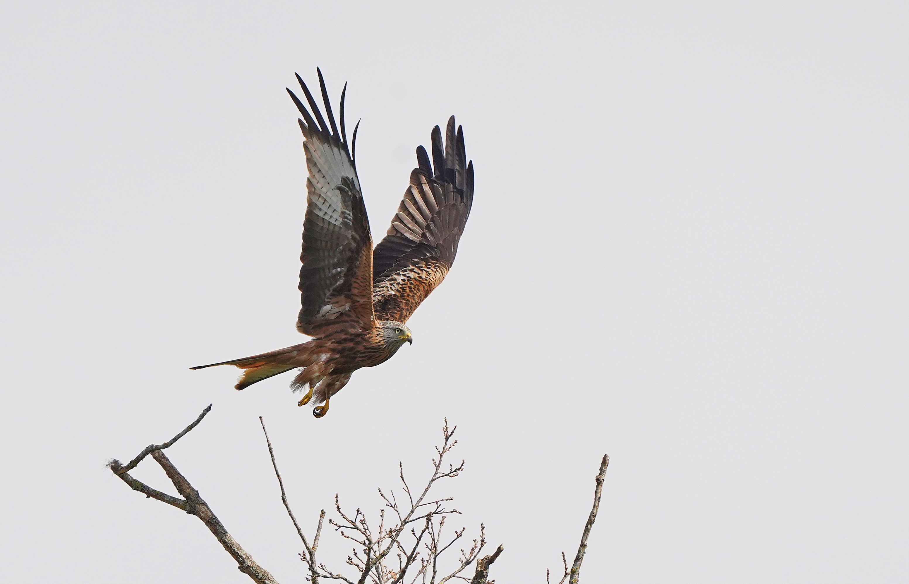 Nibbio Reale fotografato a Bad Tölz